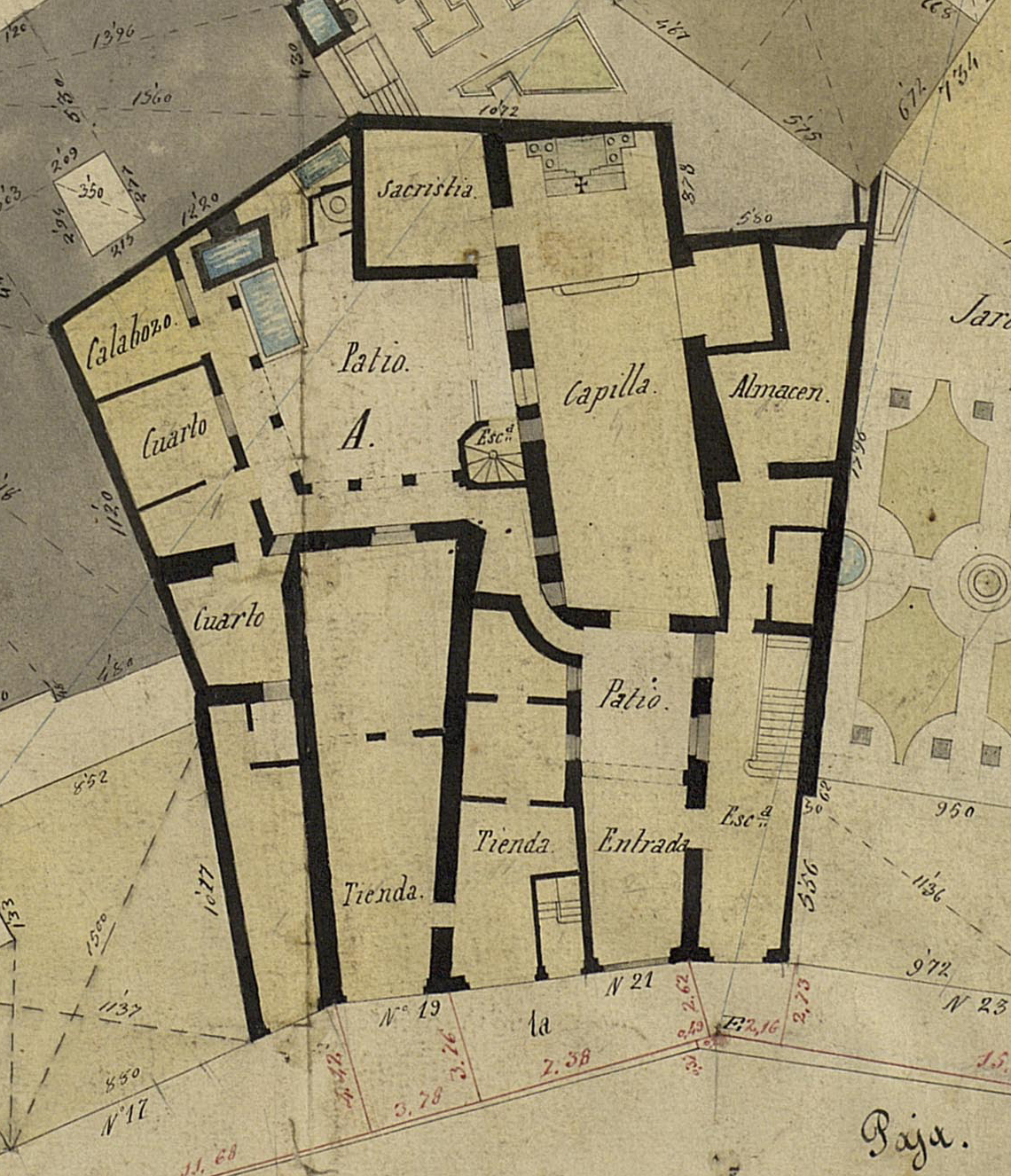 Plànol de planta de l'Hospital de Sant Sever de Barcelona, provinent dels «Quarterons Garriga i Roca»